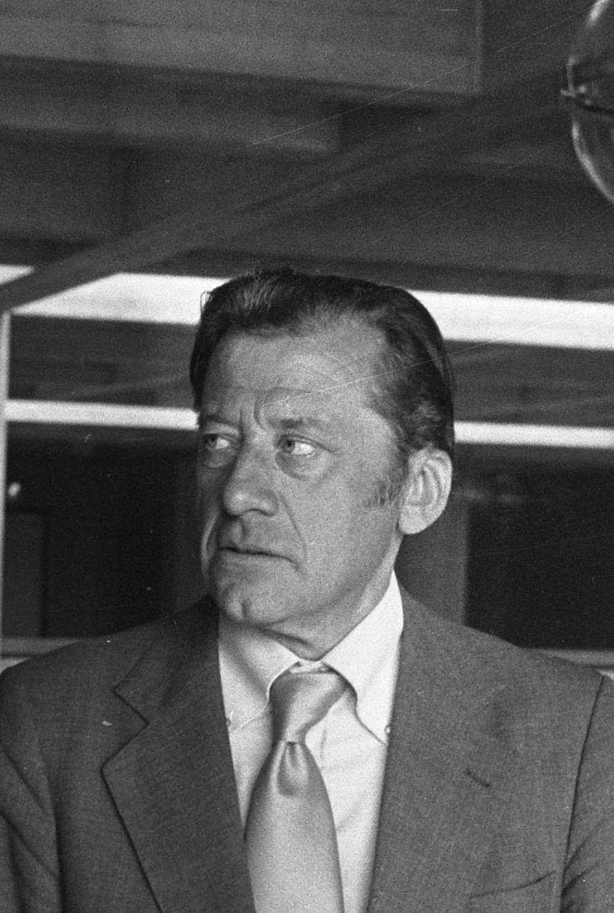 Drs. Emile Meijer (rechts), geschorste direkteur Van Goghmueum in gesprek met zijn raadsman mr. J Voerman in gebouw kantongerecht Parnassusweg